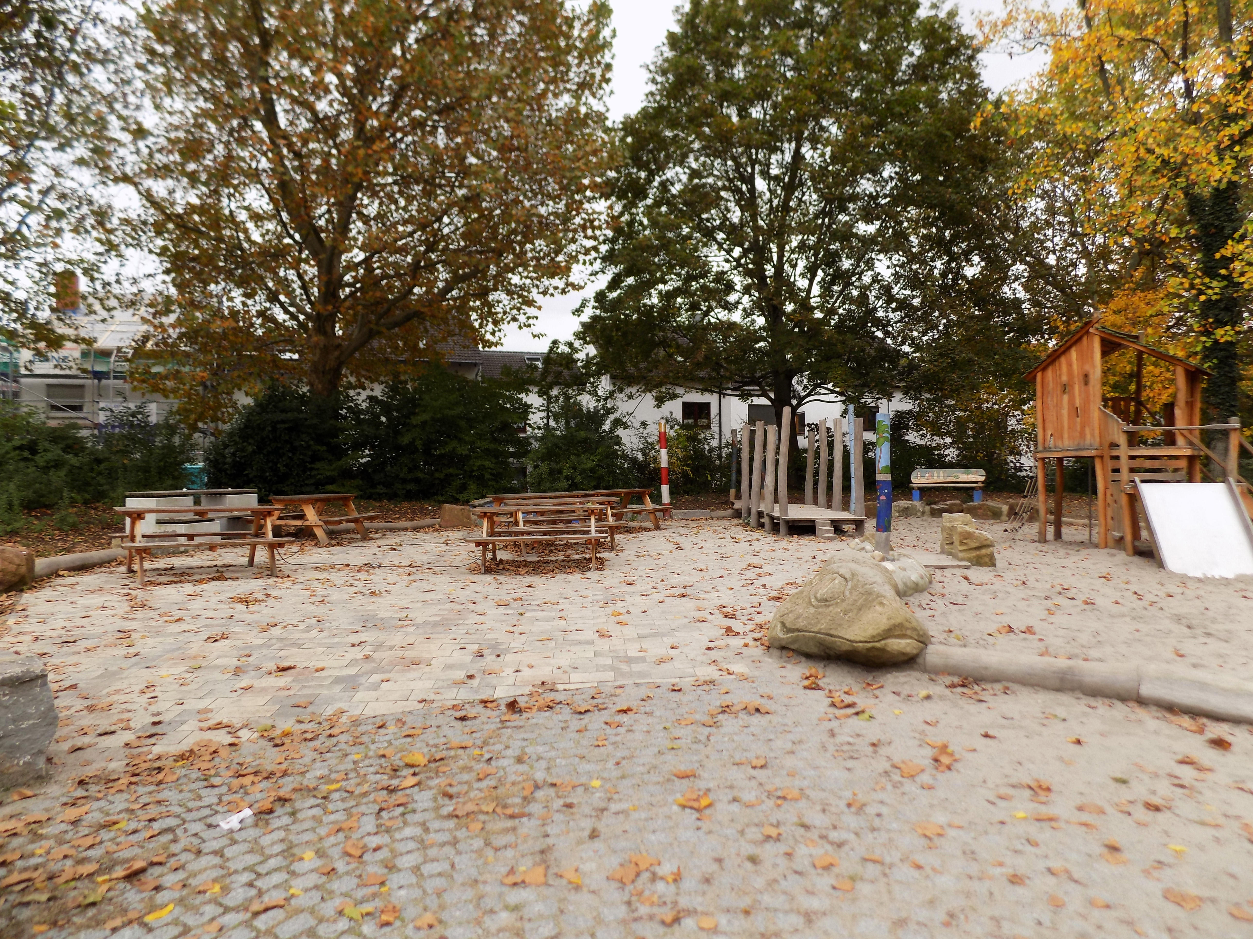 jj